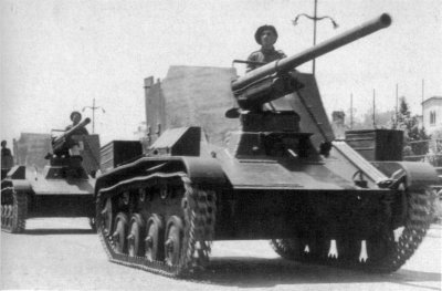 TACAM T-60驅逐戰車。